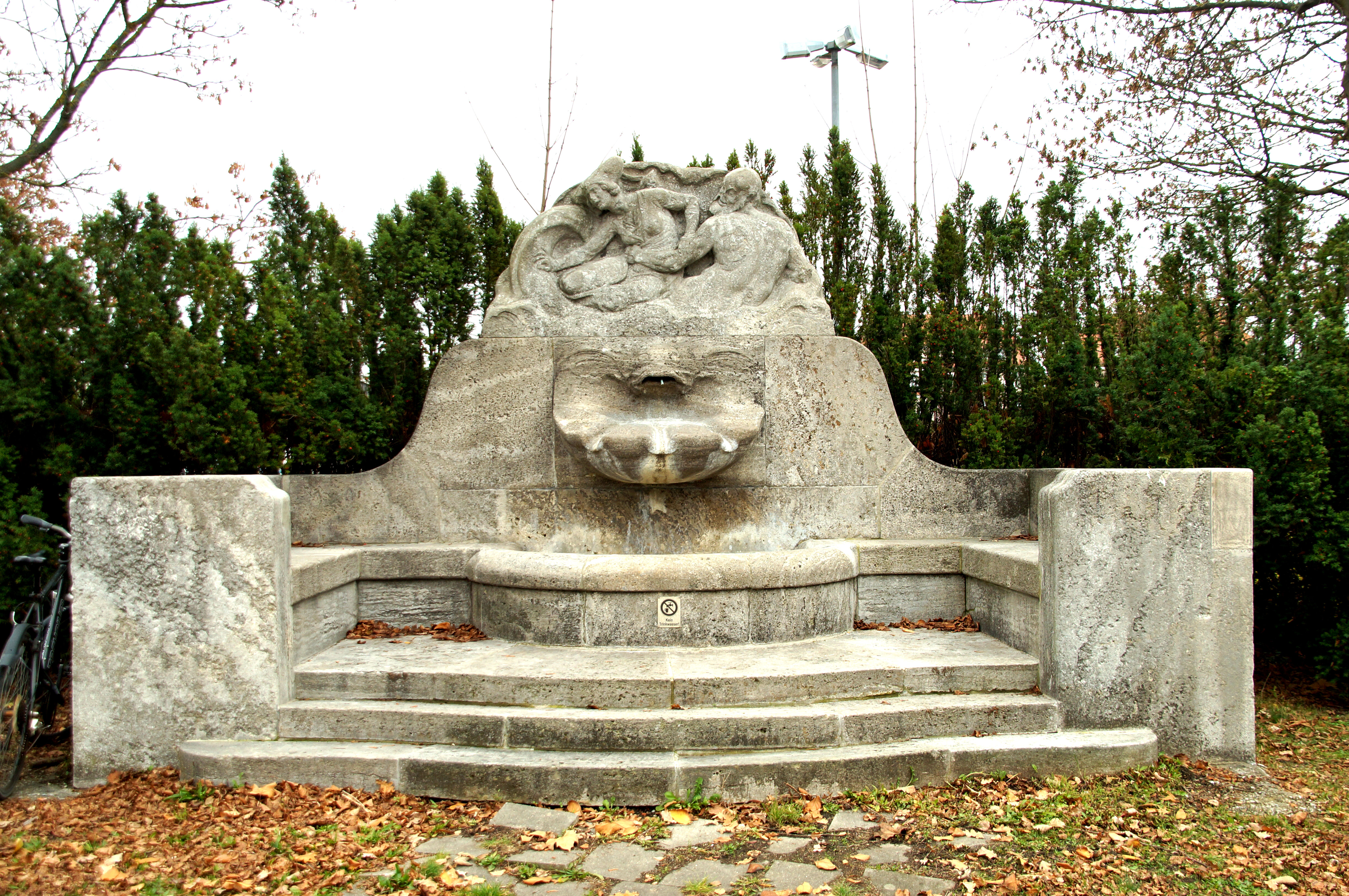 Laufbrunnen (sog. Stobäusbrunnen) mit Becken, muschelförmigem Auslauf und figürlichem Aufsatz, seitlich Wangenmauern mit Sitzbänken, Tuff- und Kalkstein, Jugendstil, um 1906/07 von Georg Albertshofer nach Entwurf von German Bestelmayer, 1965 versetzt This is a photograph of an architectural monument.